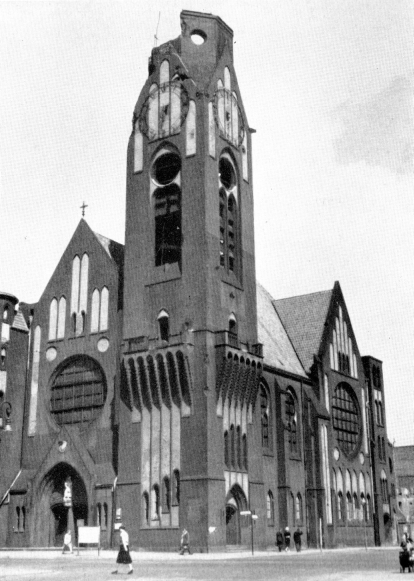 Reformationskirche Berlin-Moabit um 1950